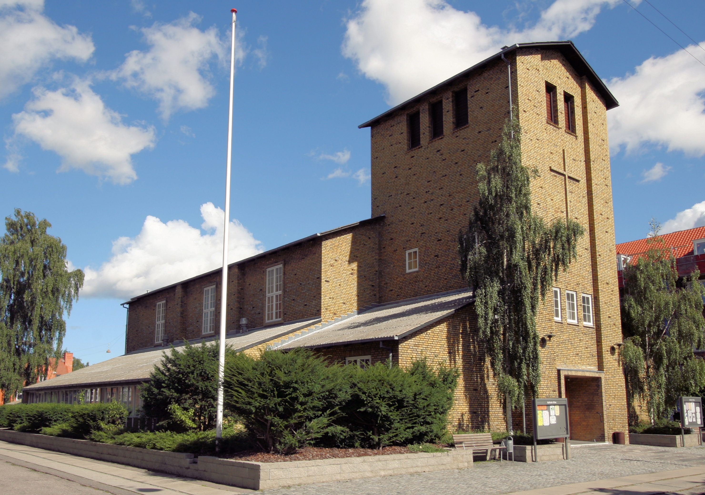 Aalholm Kirke in Copenhagen, Denmark. Exterior.